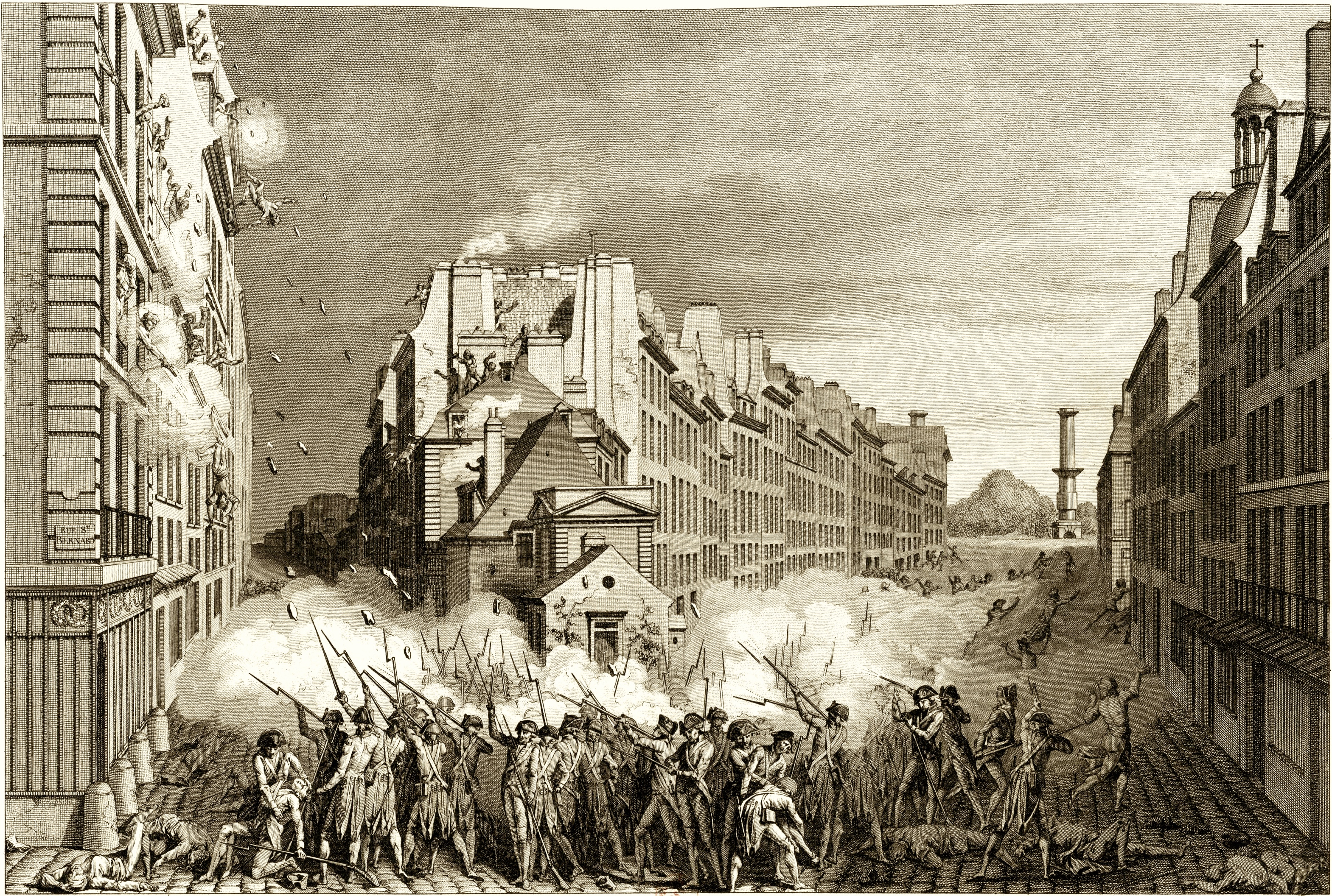 Sujet : France. Armée. Gardes françaises Sujet : France. Armée. Régiment des Gardes suisses Sujet : Paris (France) -- Rue du Faubourg-Saint-Antoine Sujet : Paris (France) -- Histoire (1789, émeutes) Sujet : Scènes historiques -- 1789-1799